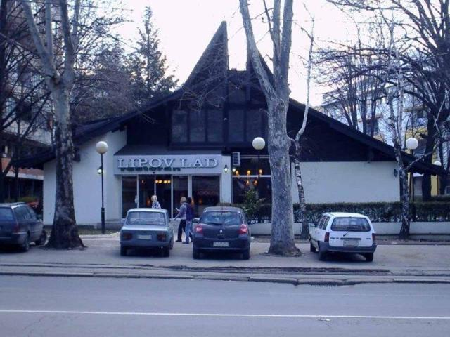 Srpskohrvatski / српскохрватски: Restoran Lipov Lad u istoimenom kraju. Snimljeno u februaru 2009.